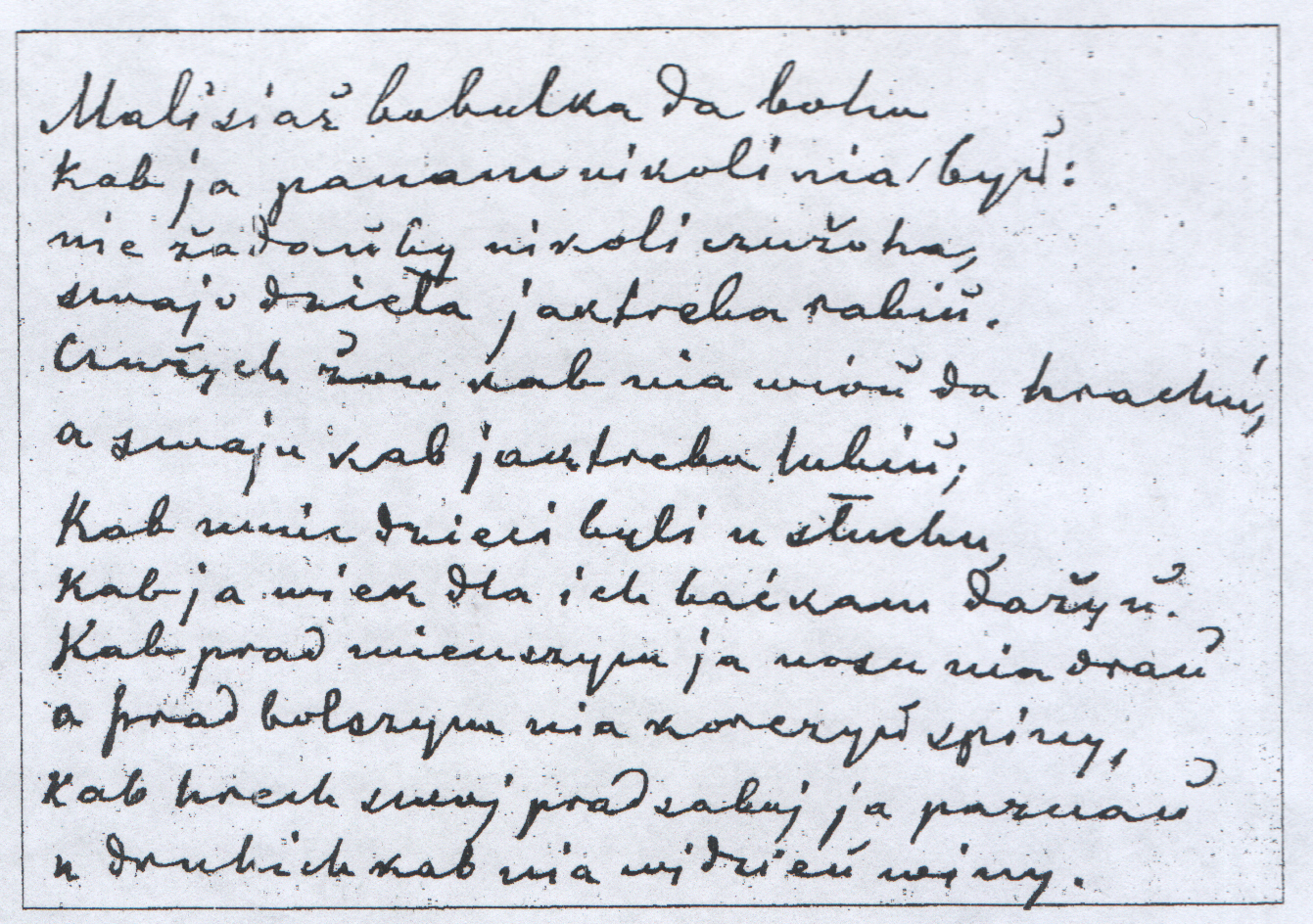 Беларуская (тарашкевіца): Аўтограф верша Багушэвіча «Маліся, бабулька, да Бога»